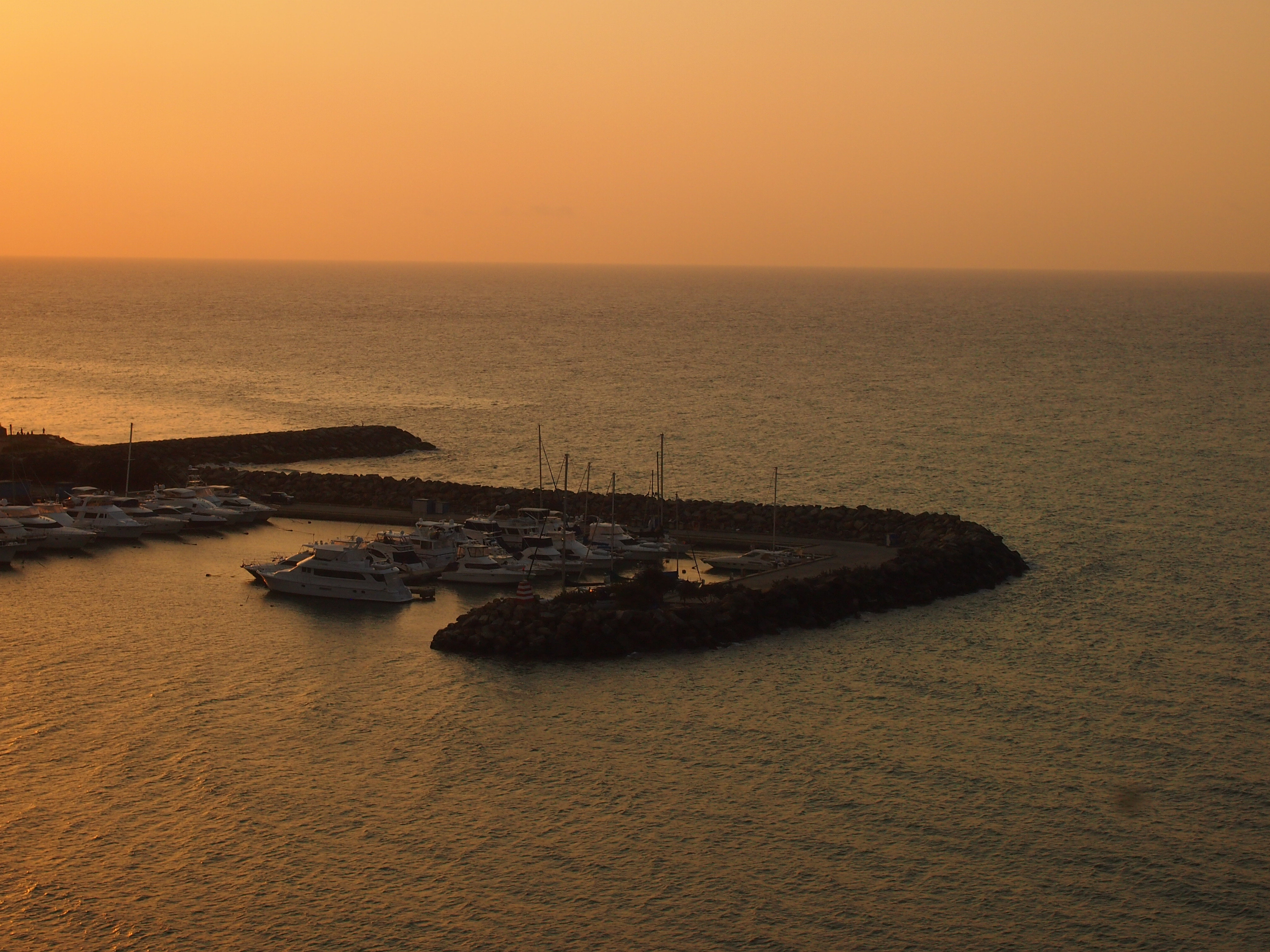 Venezuela